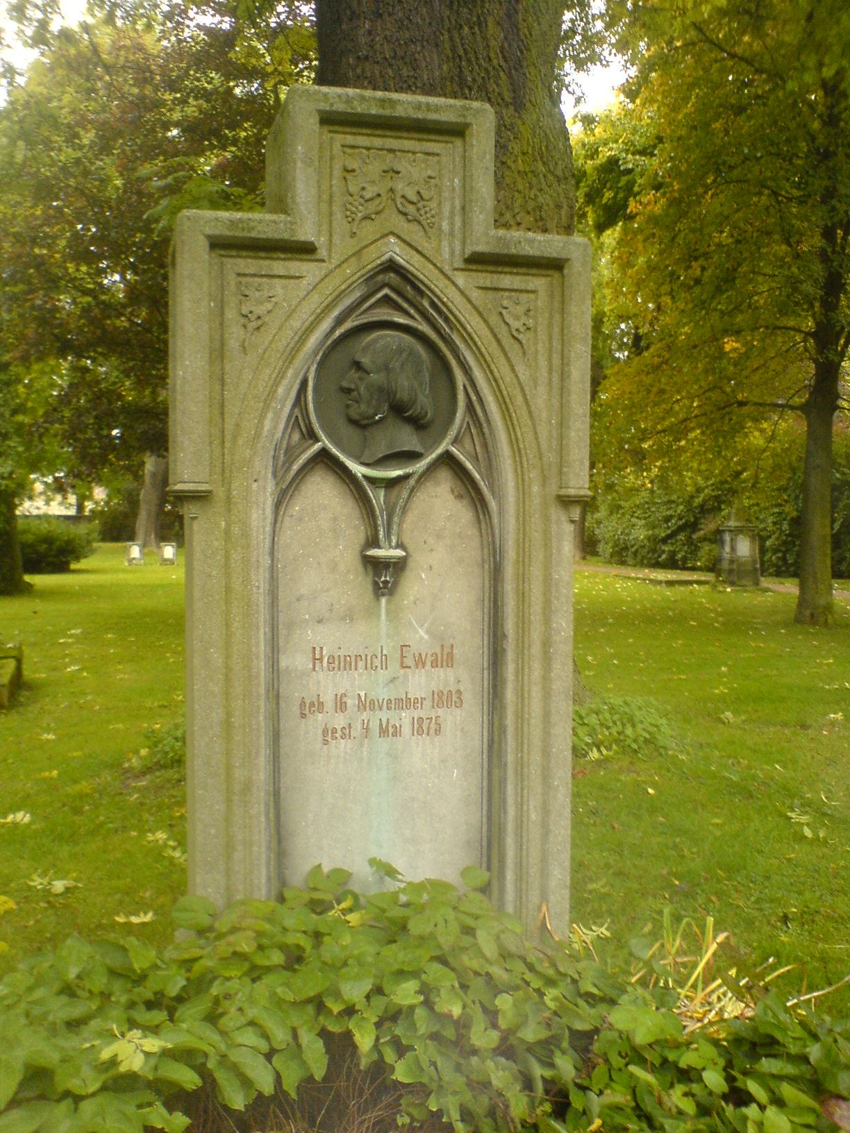 Grab des Theologen Heinrich Ewald, restauriert 2007/2008